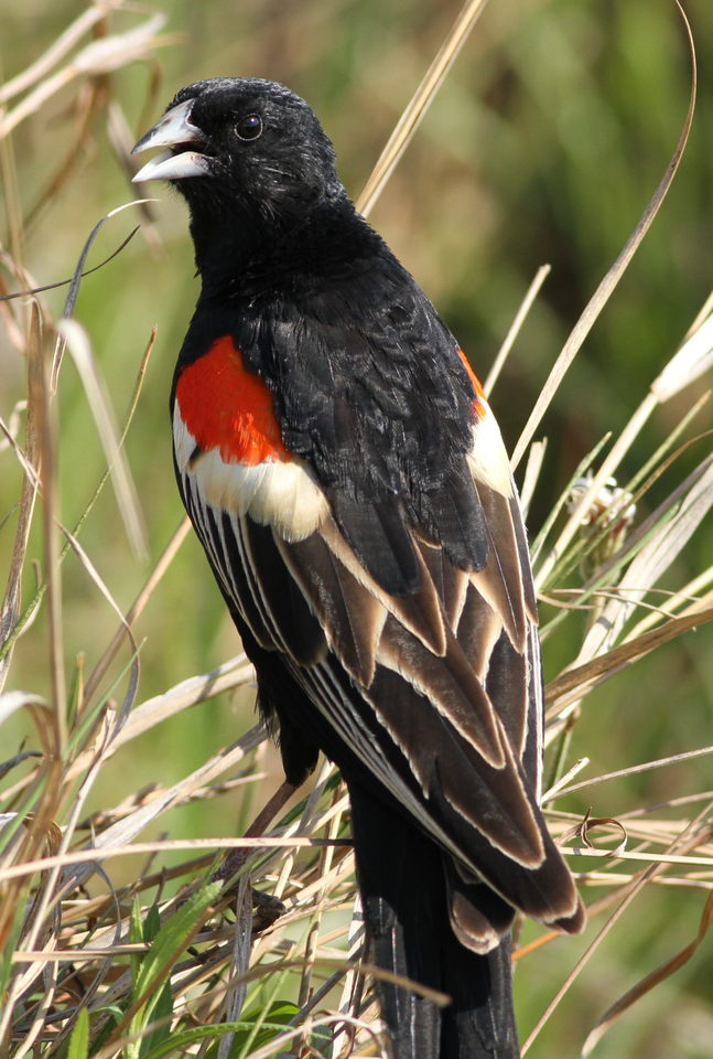 Male